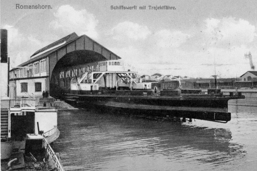 1874 stellte die Nordostbahn gemeinsam mit Bayern das Trajektschiff II in Dienst. Das auch für heutige Verhältnisse grosse Schiff vermag 18 Eisenbahnwagen zu transportieren und gleichzeitig zwei beladene antriebslose Trajektkähne über den See zu ziehen. Der Kohlenverbrauch ist allerdings mit fast 42 kg/km gross. 1927 wurde das Schiff verschrottet.